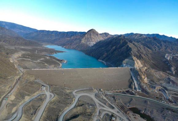 En fines de 2016 ya estara lleno el ambalse